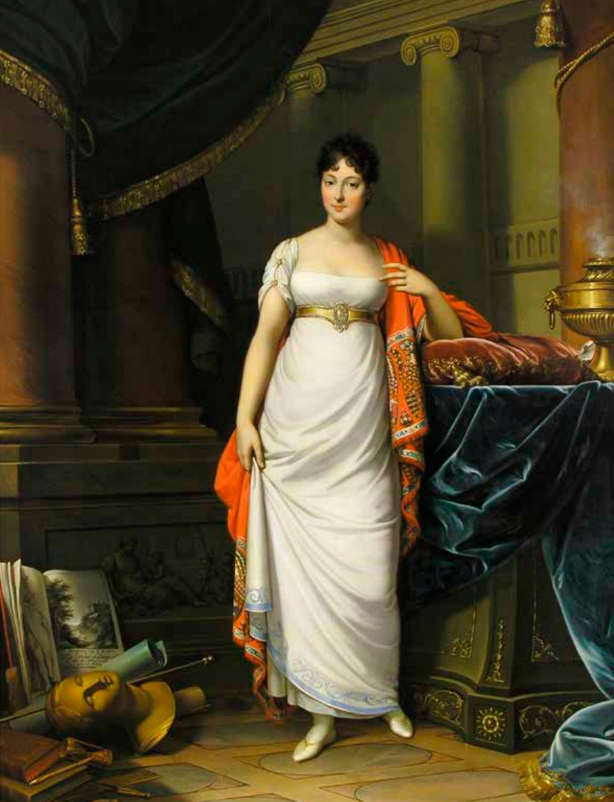 portrét Pavlína ze Schwarzenbergu (1774-1810)